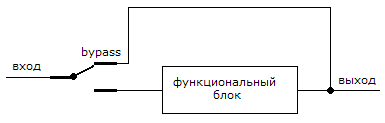 Схема реализации байпаса